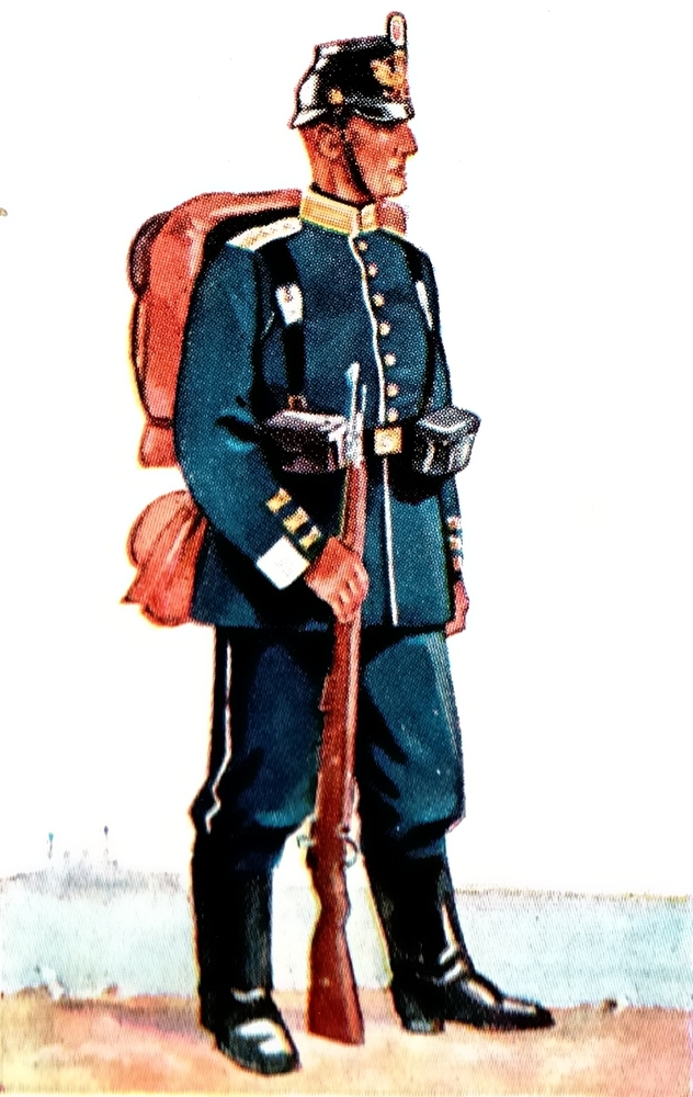 Seesoldat der Kaiserlichen Marine feldmarschmässig um 1910